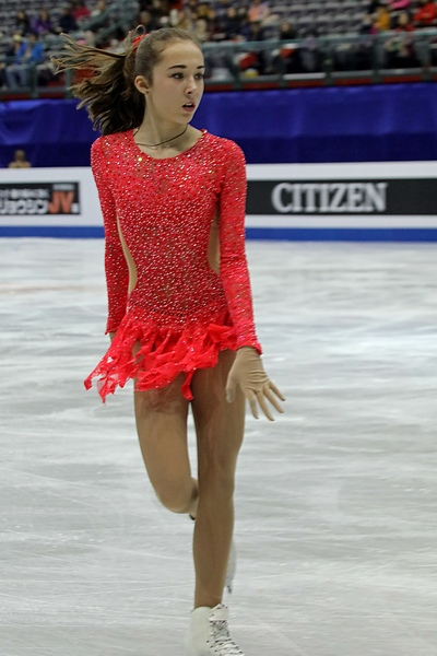 Анастасия Гожва (Украина) на чемпионате мира среди юниоров 2017